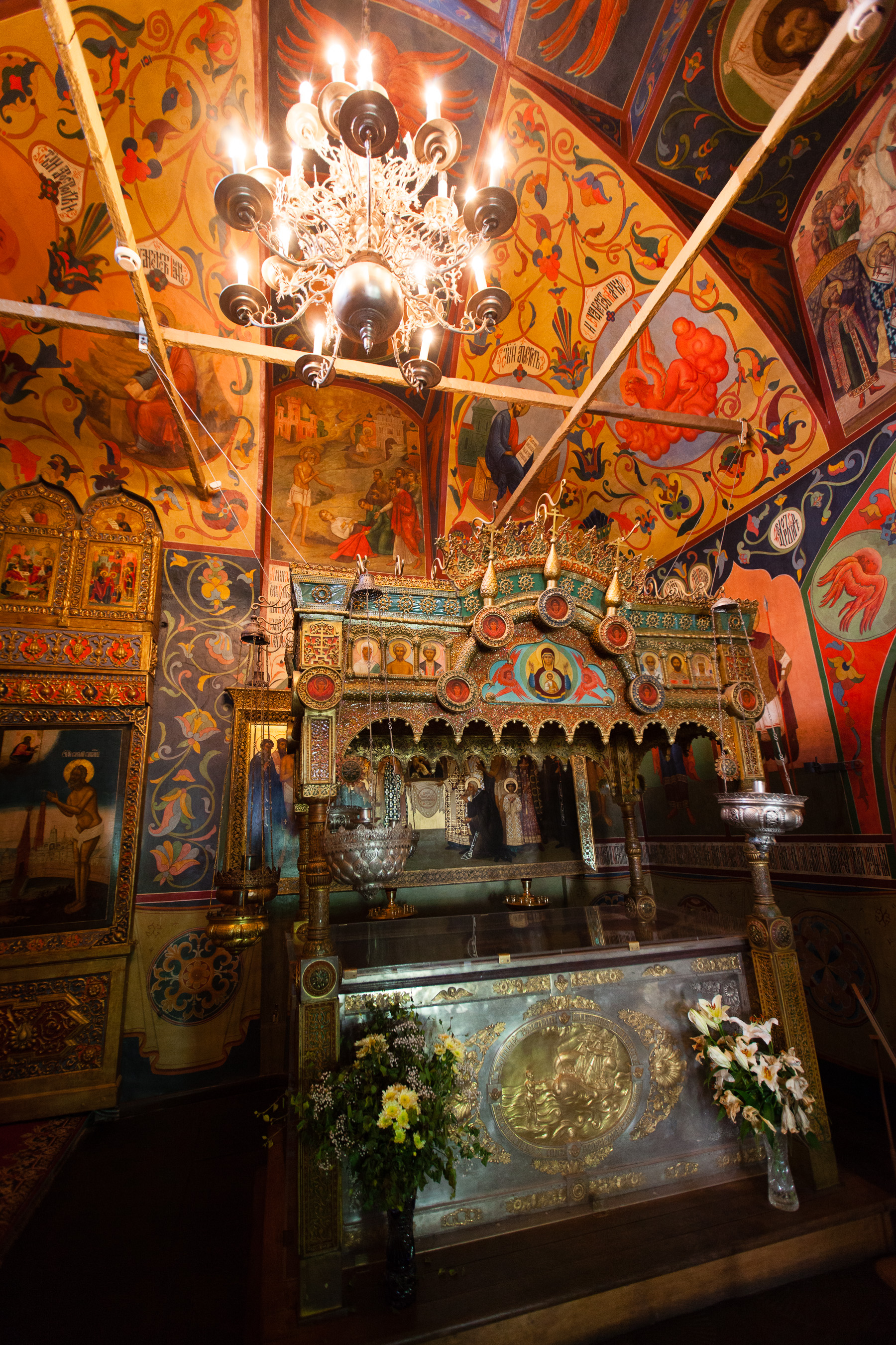 Moscow